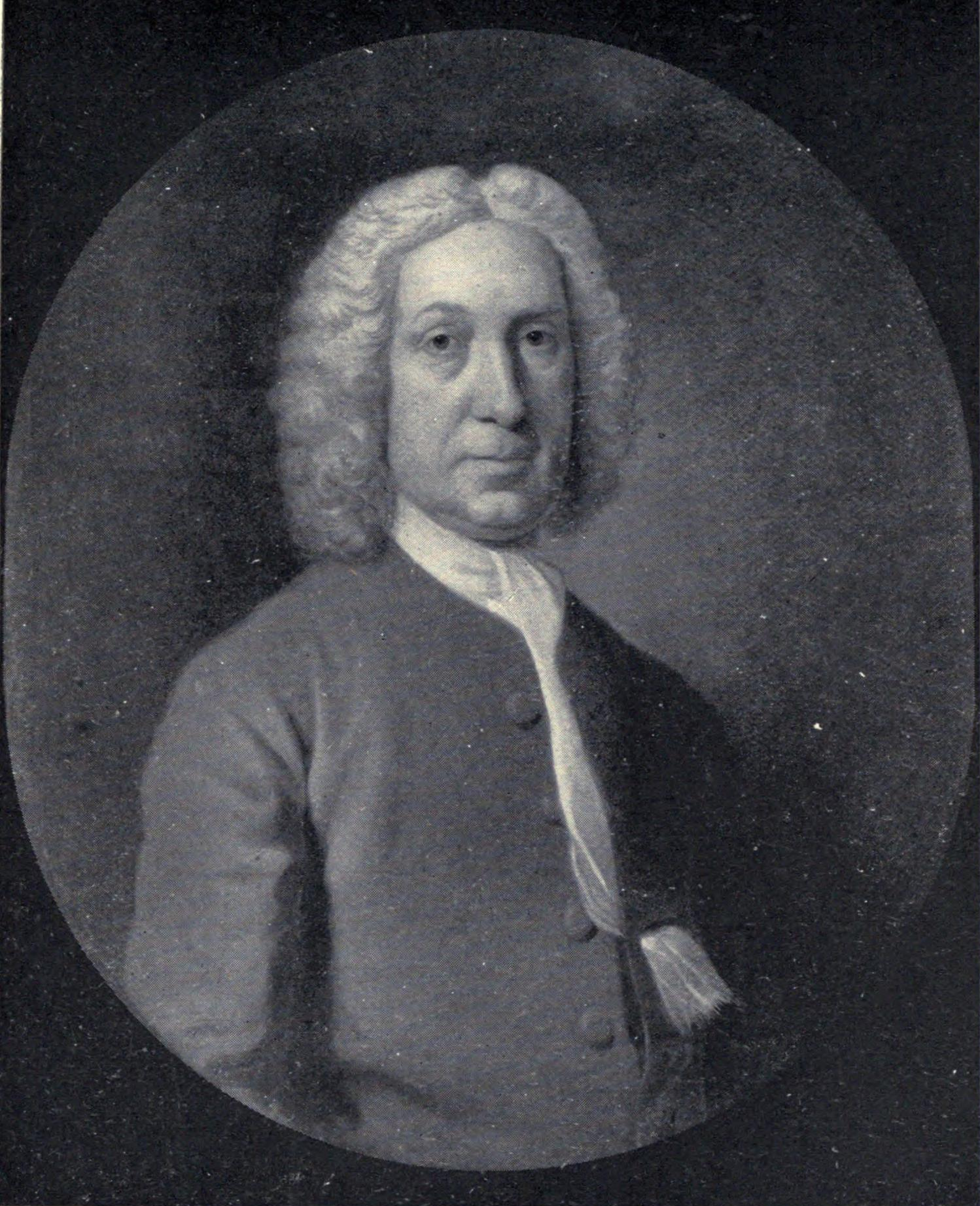 Thomas Ruddiman (1674–1757)